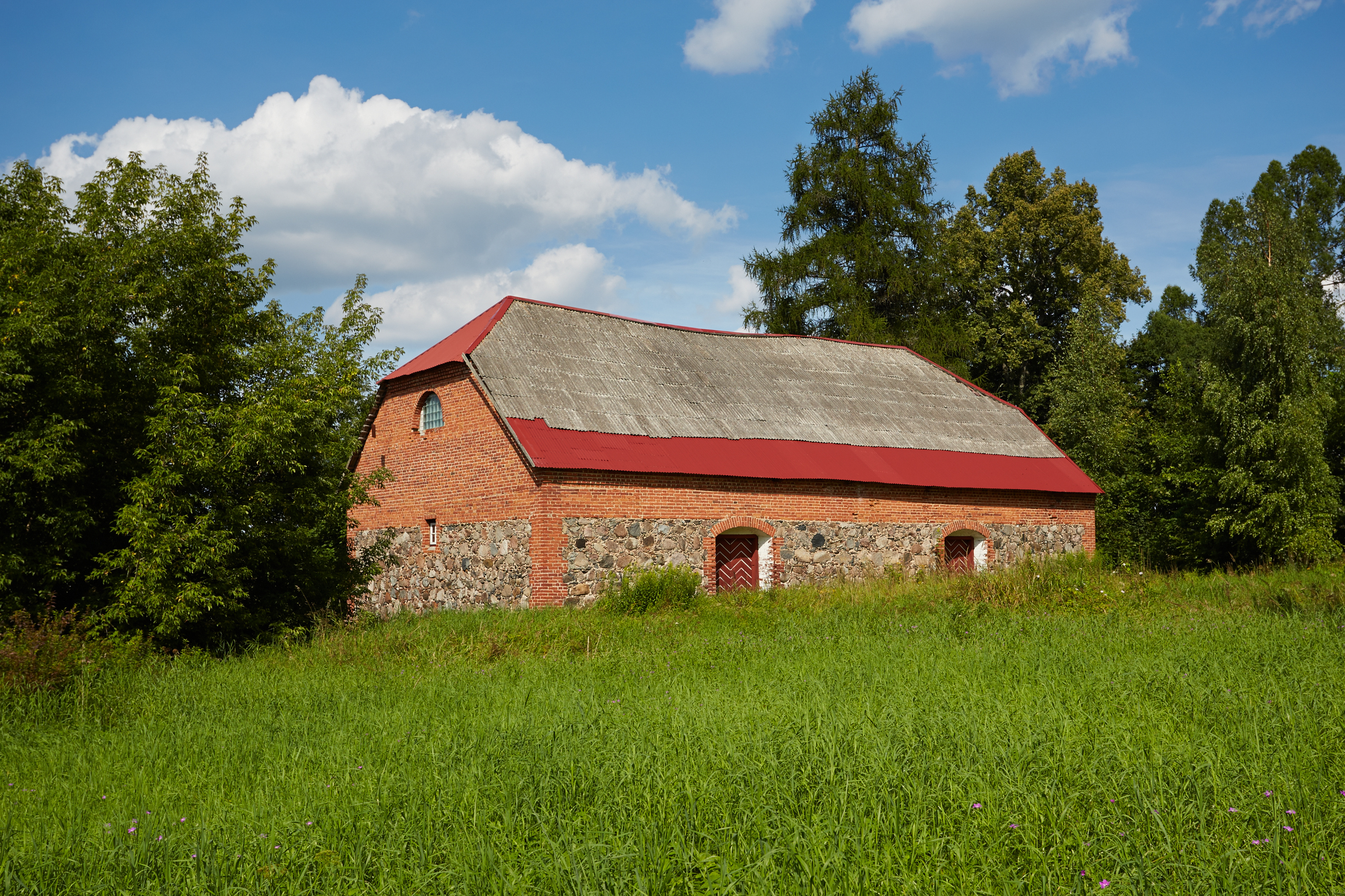 Tsooru mõisa ait 2013. aasta augustis.